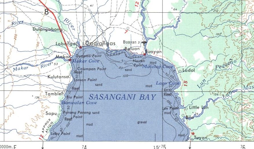 fragmento hoja NB 51-8 Koronadal que comprende el norte de al bahía de Sansangani Philippines 1:250,000 Series S501, U.S. Army Map Service, 1954